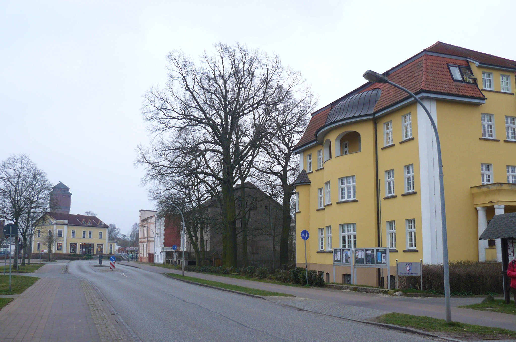 Neustadt (Dosse) city center.